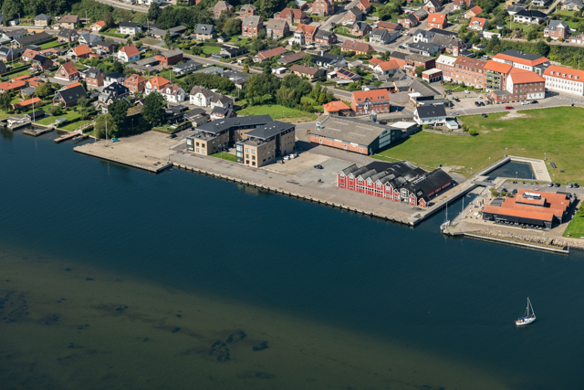 Hadsund Havn i 2019